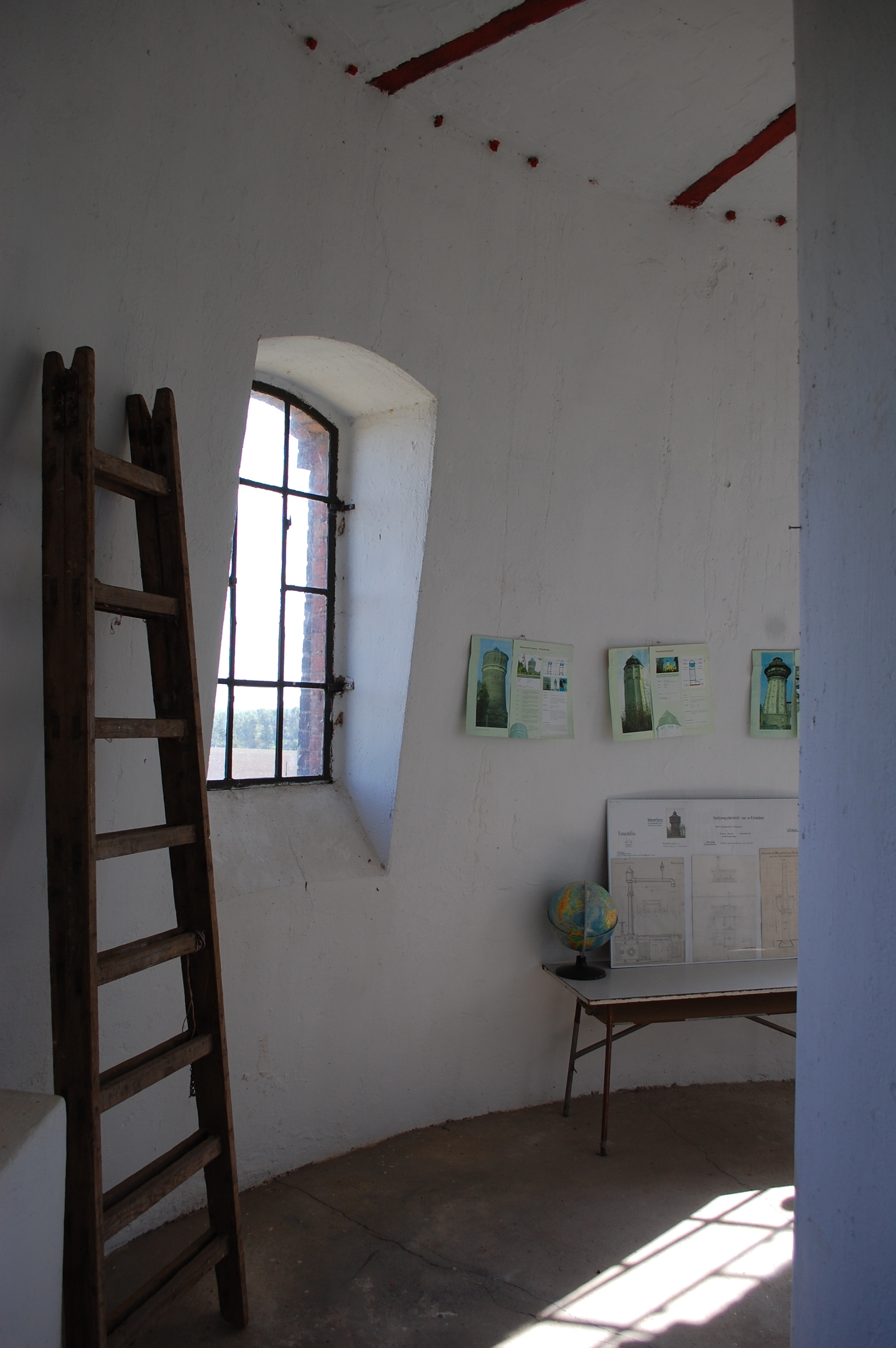 Eilsleben Wasserturm Innen